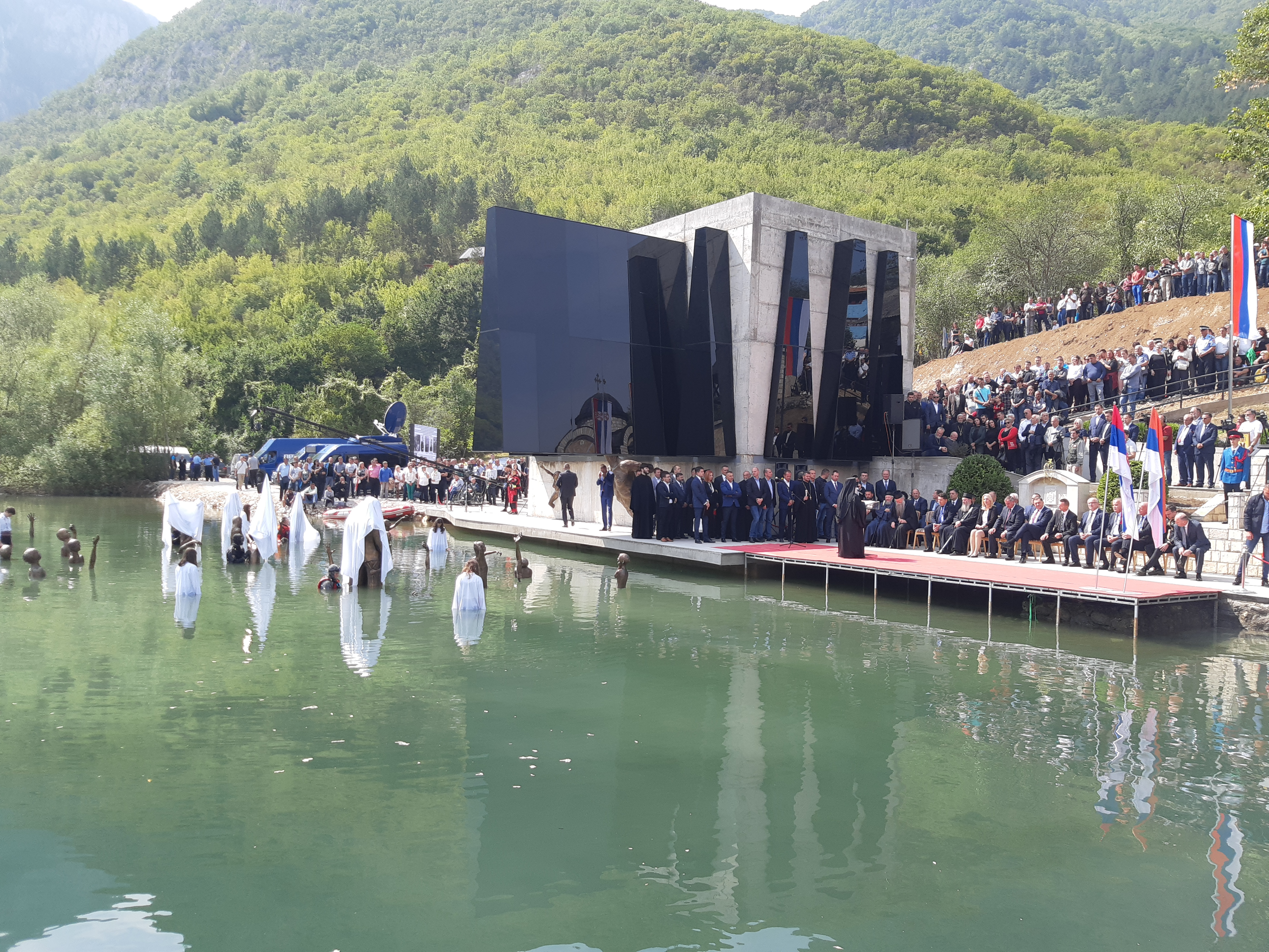 Stari Brod - Kao znak sećanja na srpske mučenike stradale u pokolju ustaša 1942. godine, 7. septembra 2019. godine u Starom Brodu osveštan je Spomen-muzej za koji je projekat uradio arhitekta Novica Motika iz Zvornika.